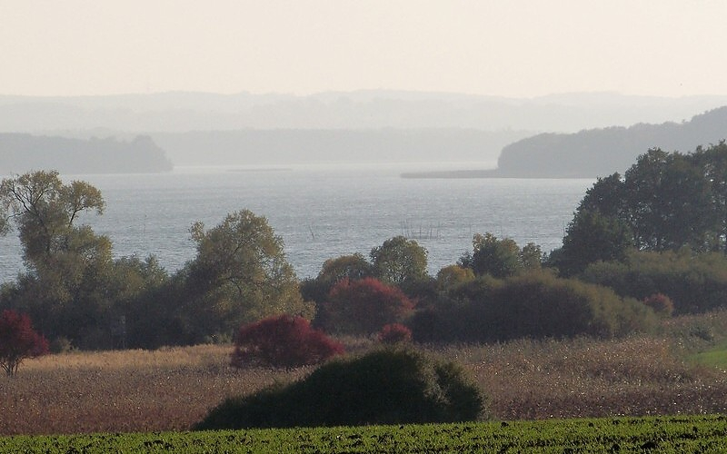 Blick von Wendischhagen über den Malchiner See nach Süden